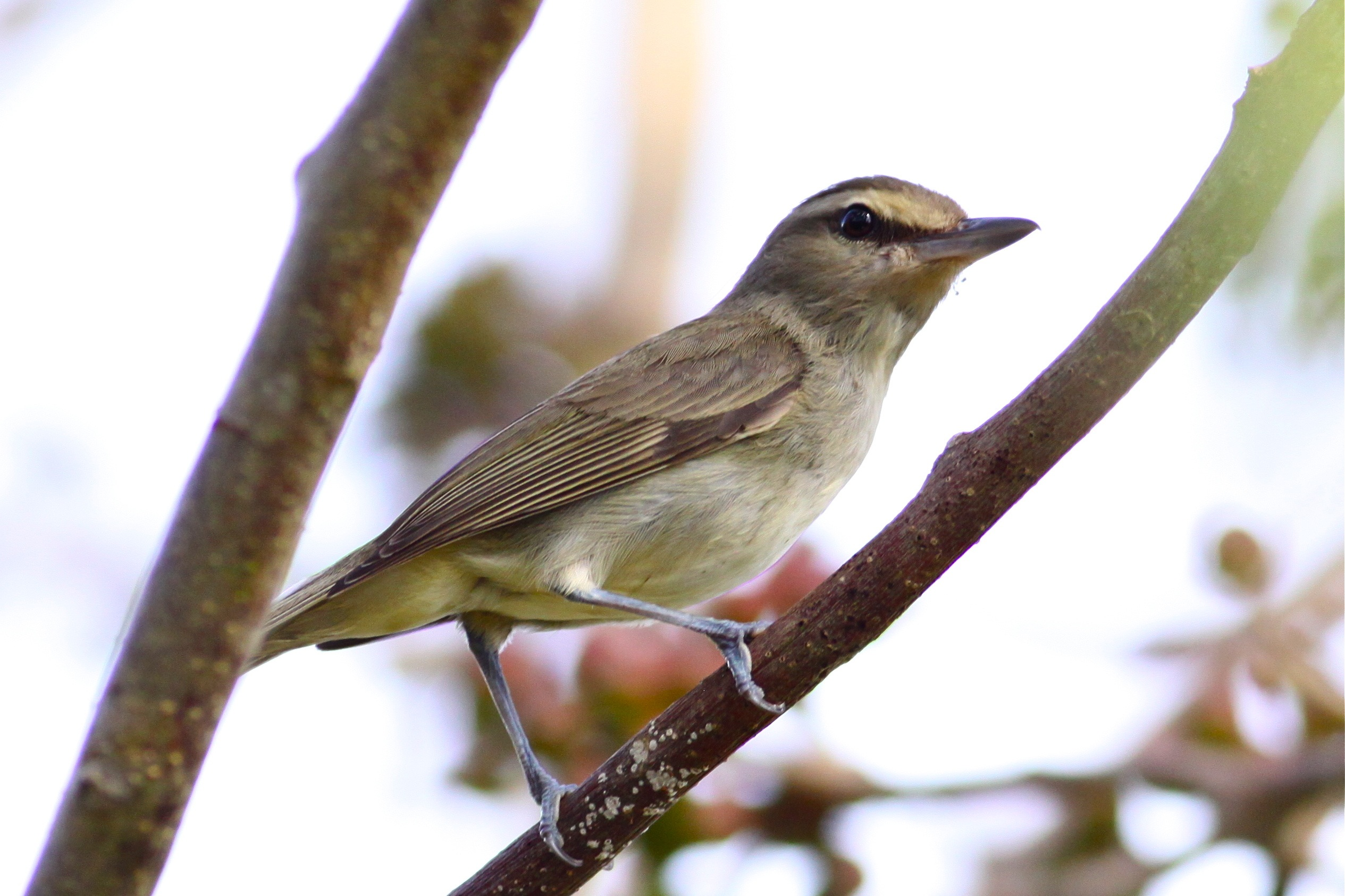 Cozumel Island, Mexico.